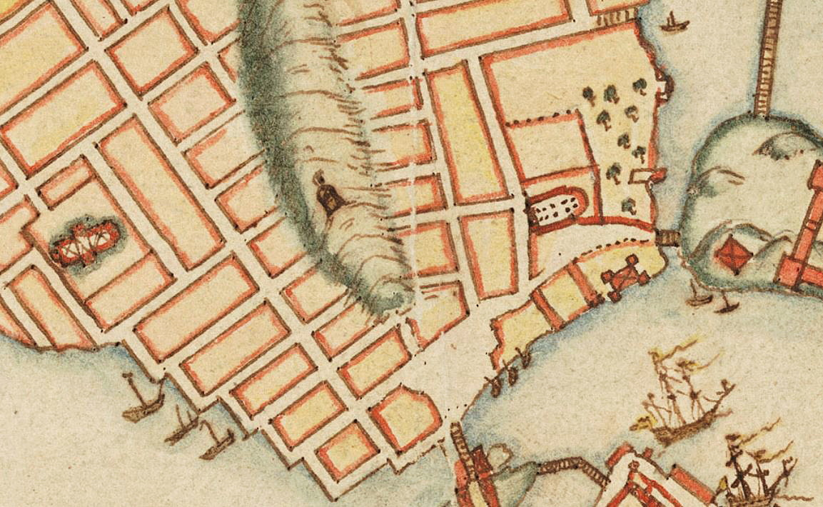 Nedre Norrmalm och Brunkebergsåsen med vårdtornet